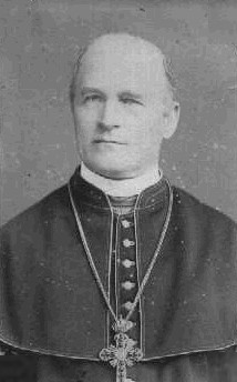 František Seraf. Hrádek (1833-1903), český římskokatolický kněz